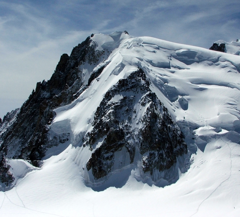 Mont Blanc du Tacul from Aiguille du Midi